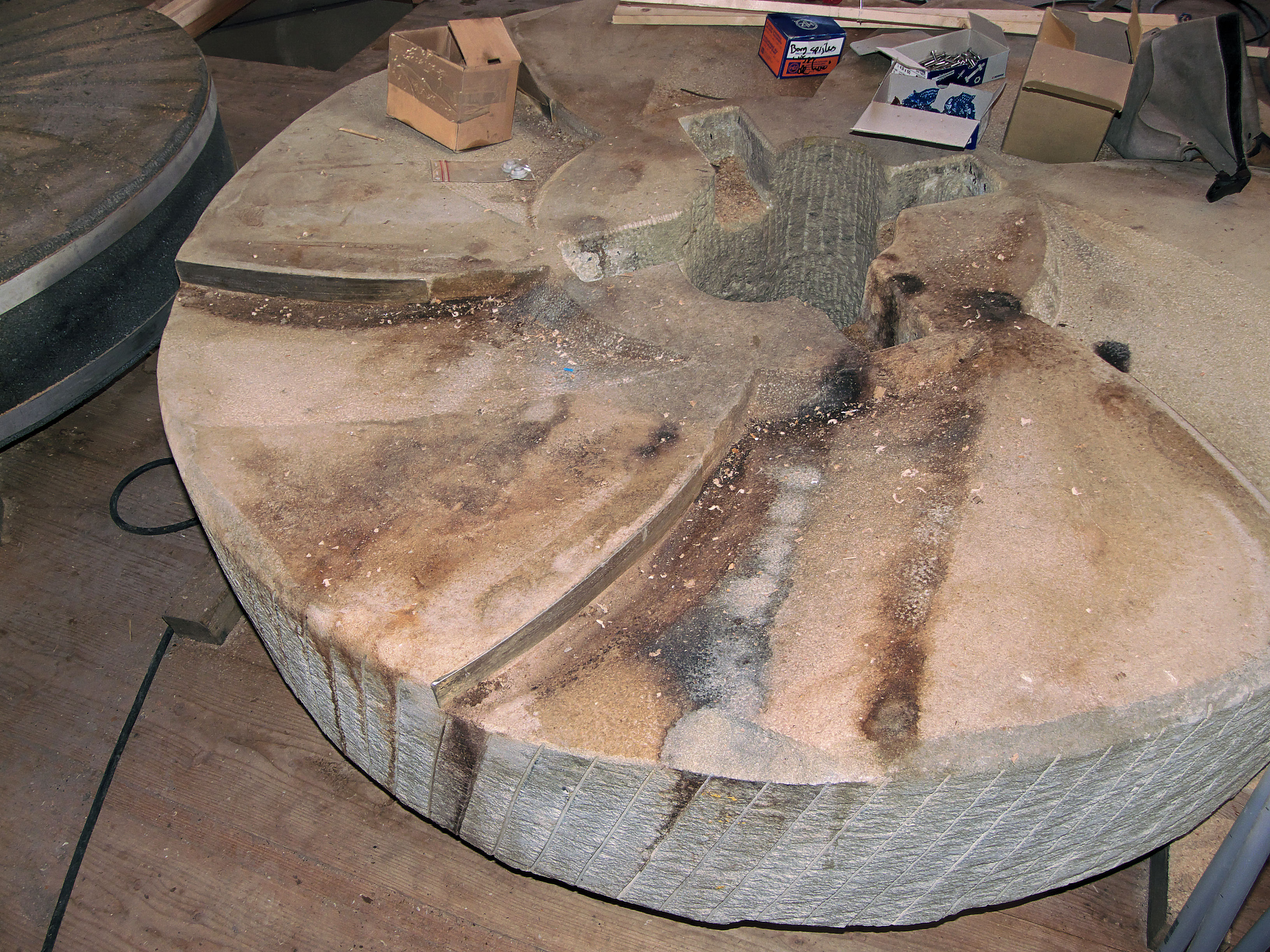 Molen De Koe Ermelo pelsteen